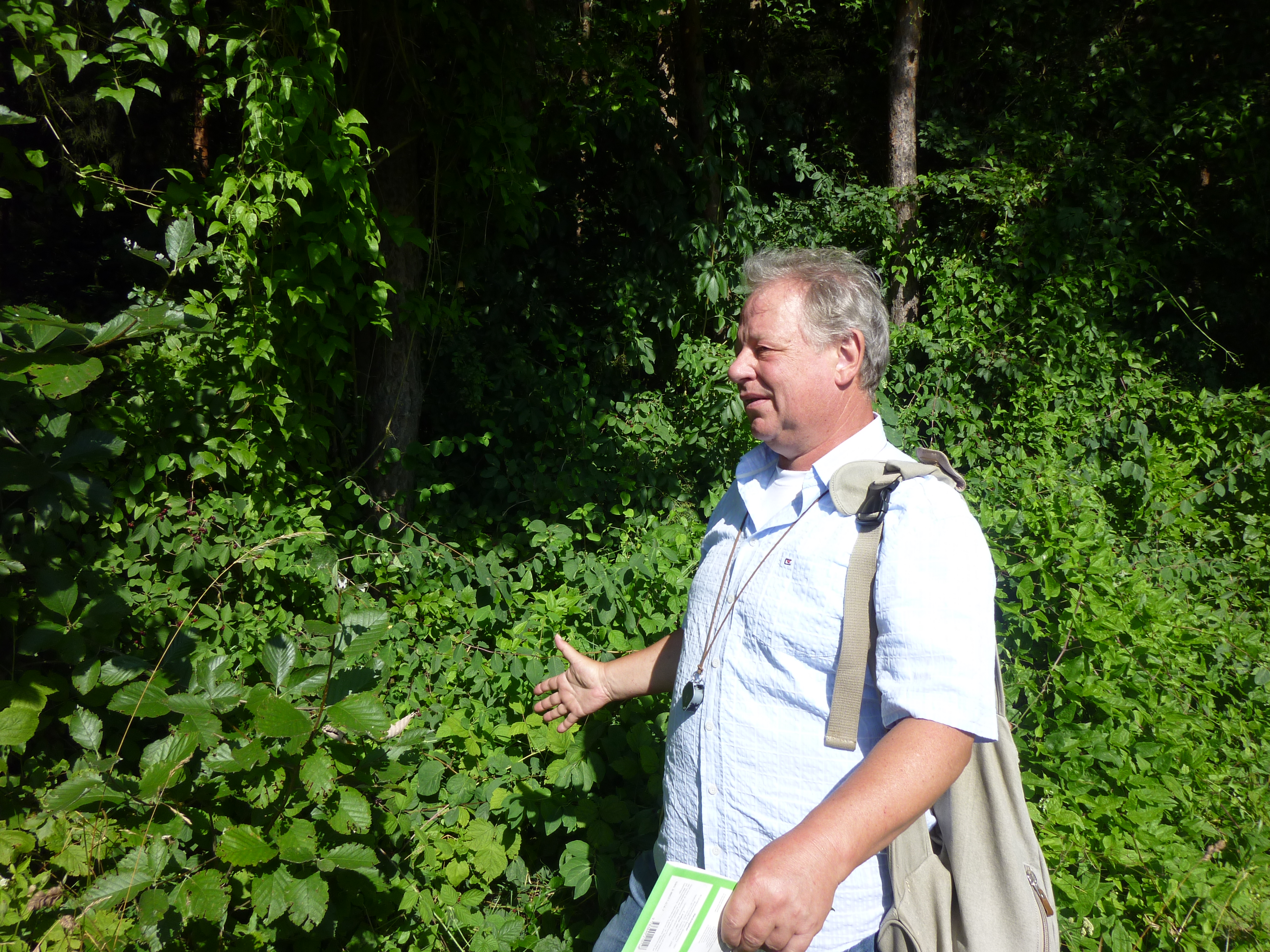 Norbert Meyer 20.07.2013 Sorbus-Exkursion im Main-Tauber-Gebiet